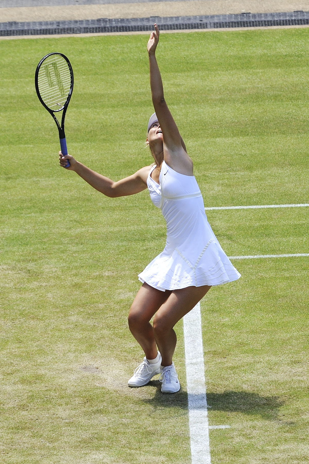 Maria Sharapova – Wimbledon 2009